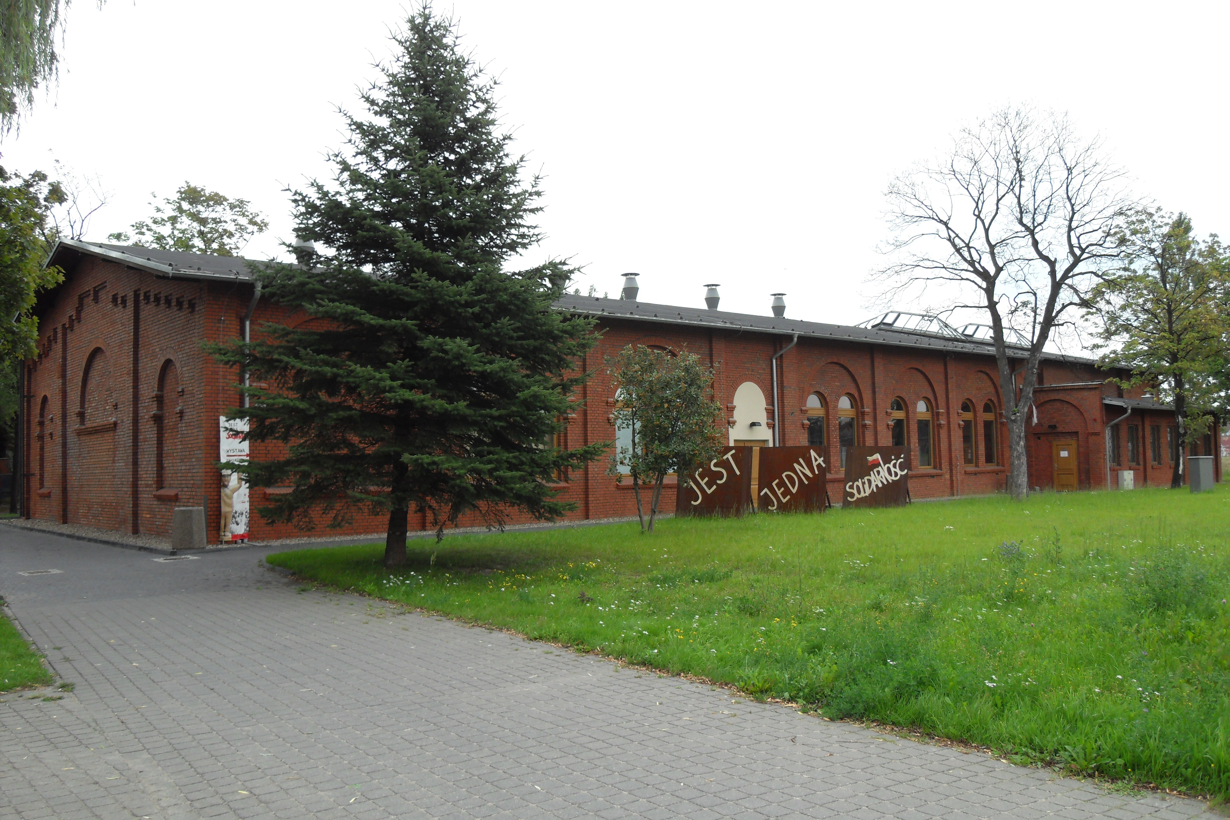 Stocznia Gdańska, sala BHP.